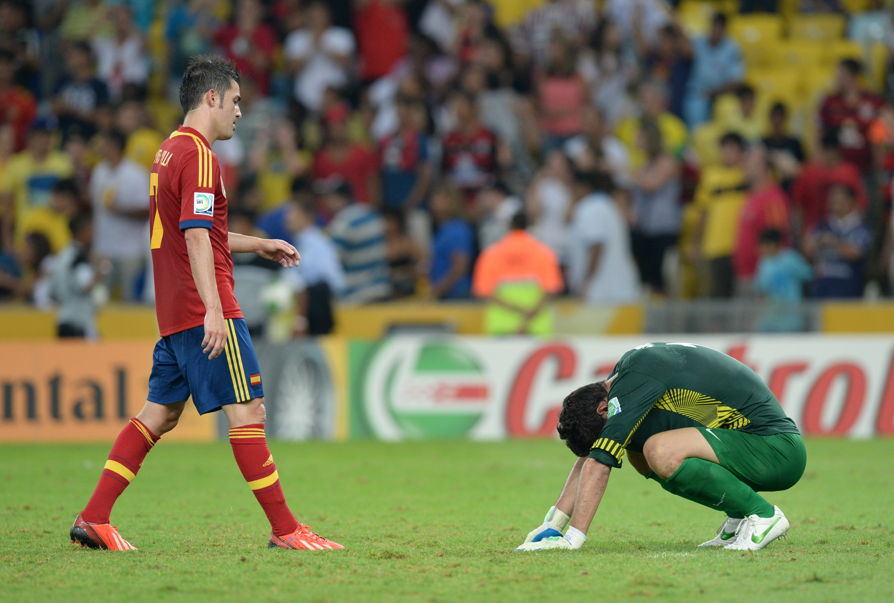 Espanha e Taiti se enfrentam na Copa das Confederações 2013